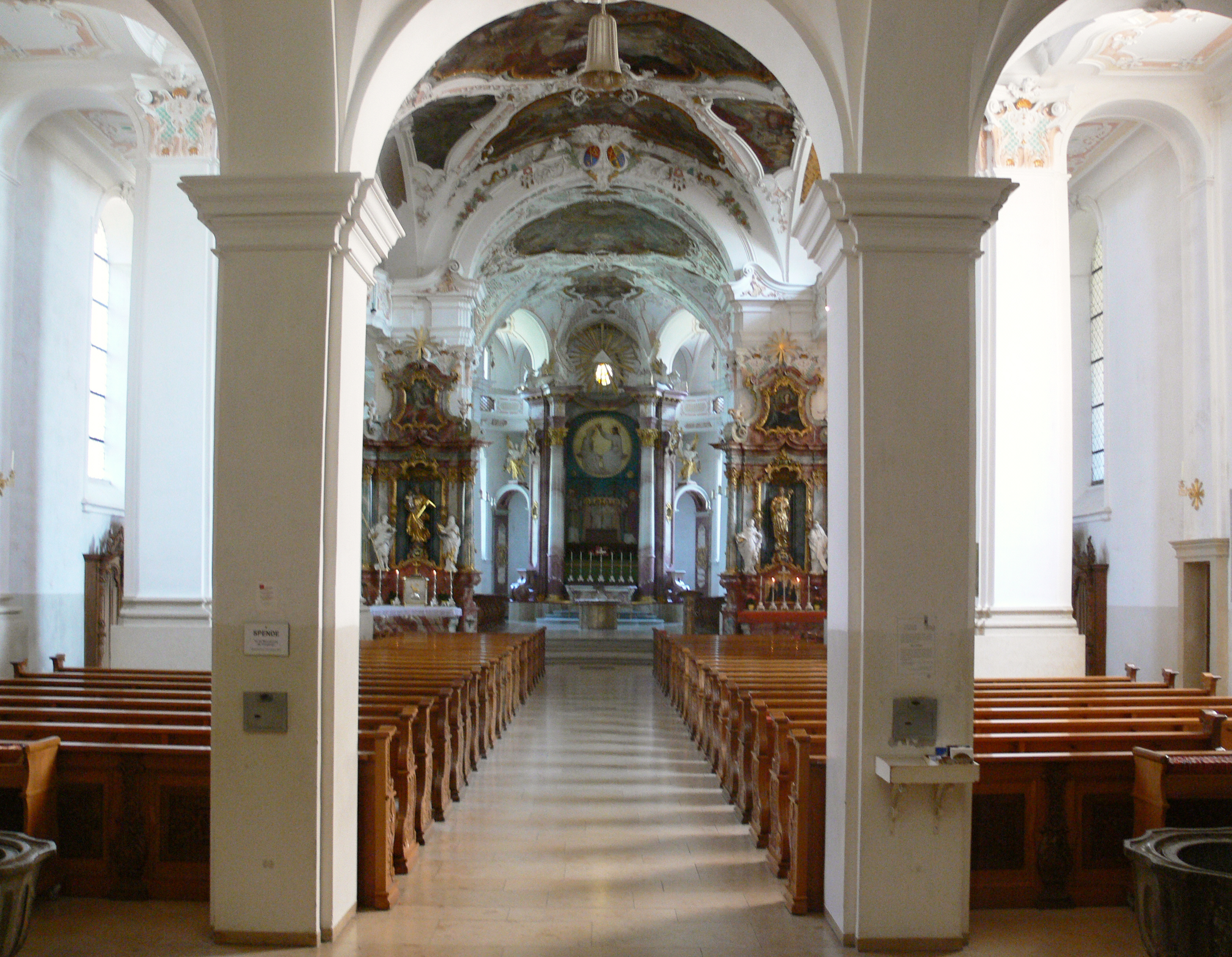 Abteikirche St. Martin, Beuron Blick vom Haupteingang in das Schiff in Richtung Chor